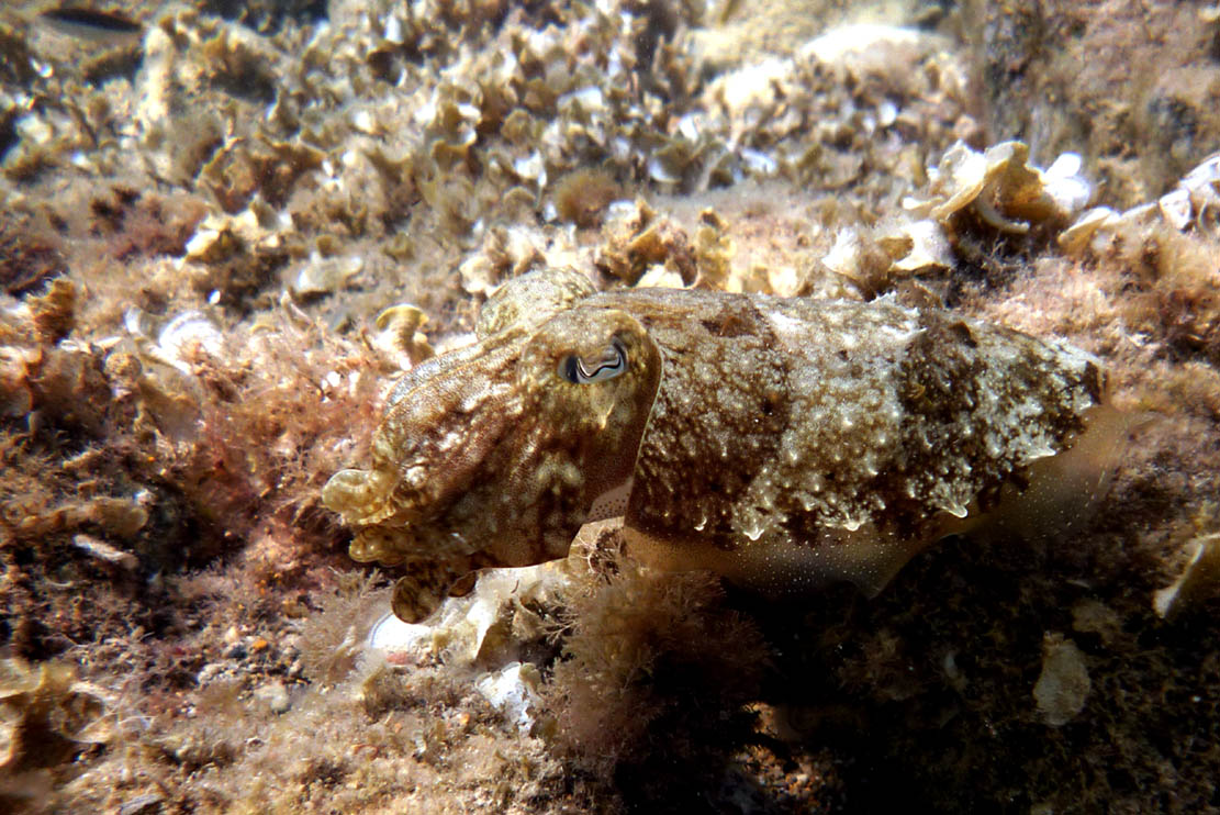 Sepia elegans (sepia pequeña) en la playa de El Portús (Cartagena, España)